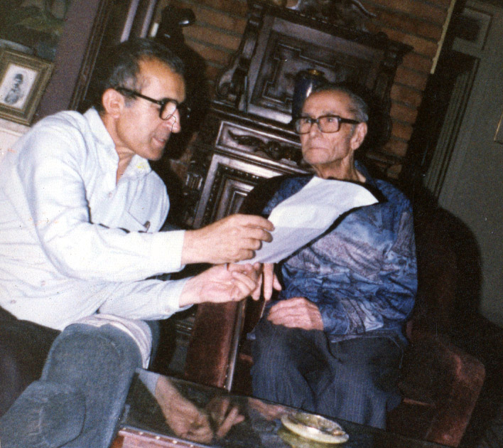 Tamanna khanlari photo from my personal album